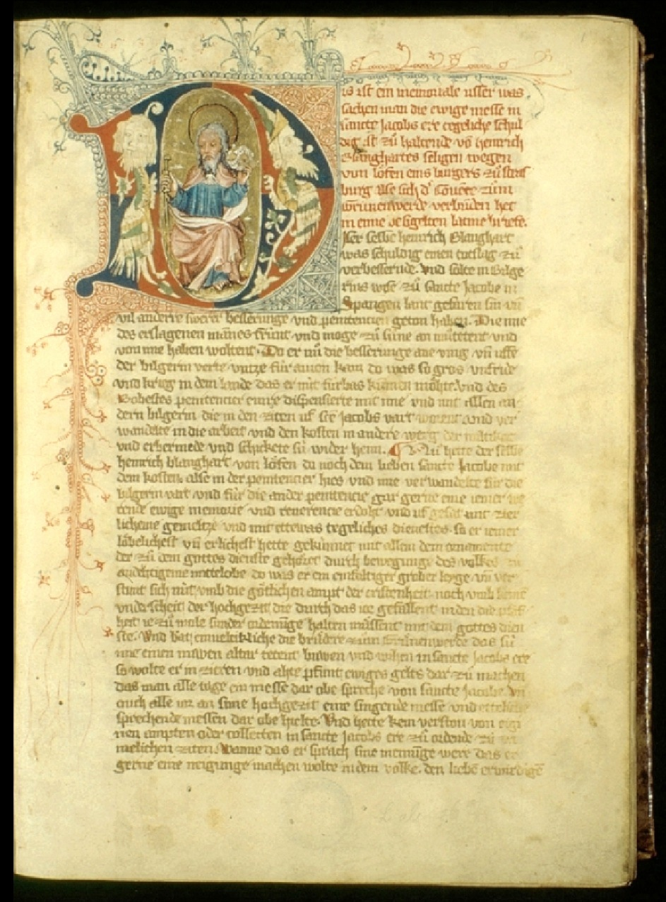 Merswin, Rulman (1307-1382) Mémorial de la commanderie Saint-Jean de Strasbourg Strasbourg, fin XIVe. Parchemin, 46 x 30 x 11 cm. Strasbourg, BNUS